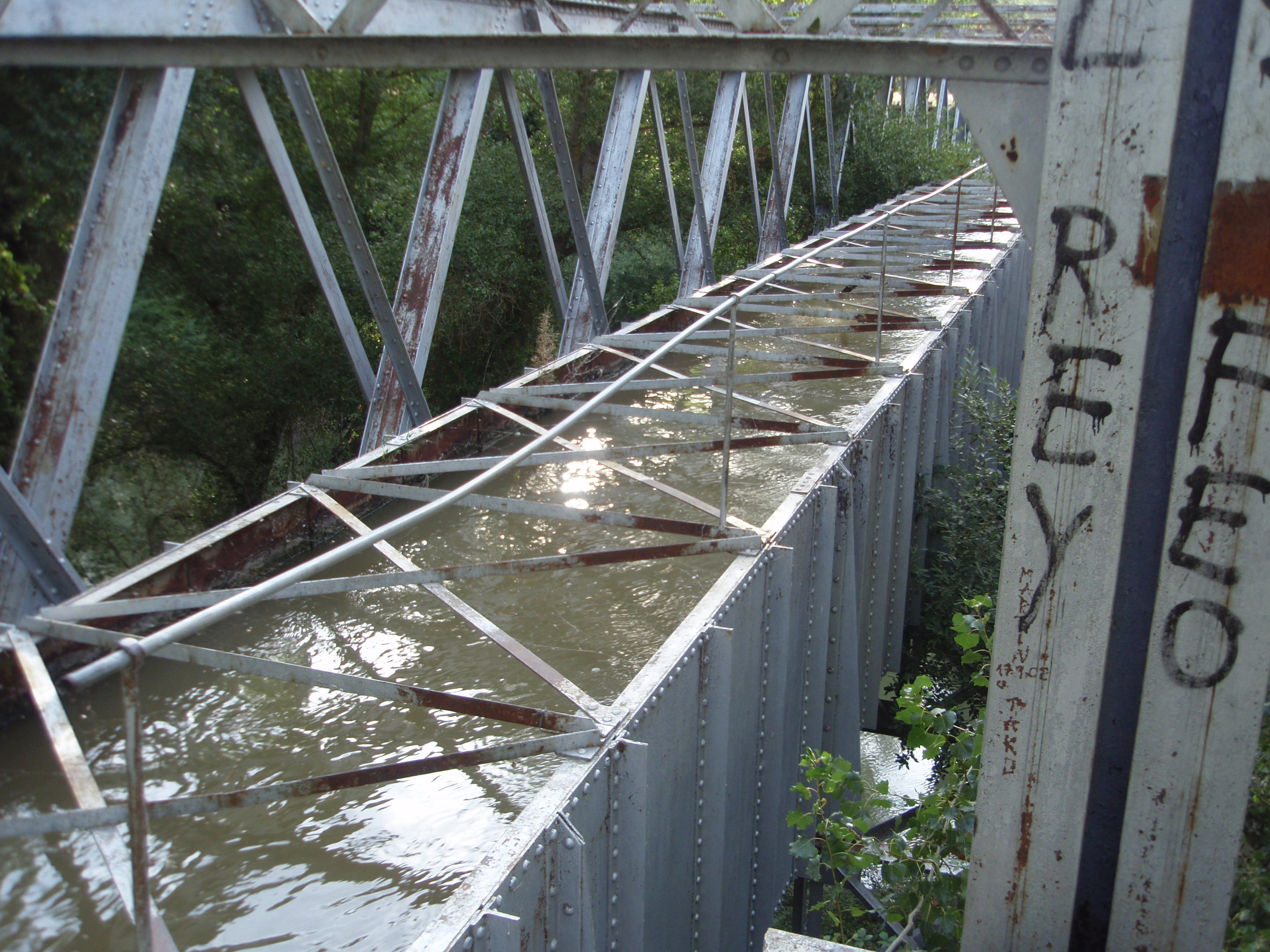 Puente del Canal del Duero cruzando el Río Duero. Tudela de Duero